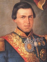 General Jorge Córdova, presidente de Bolivia de 1855 a 1857